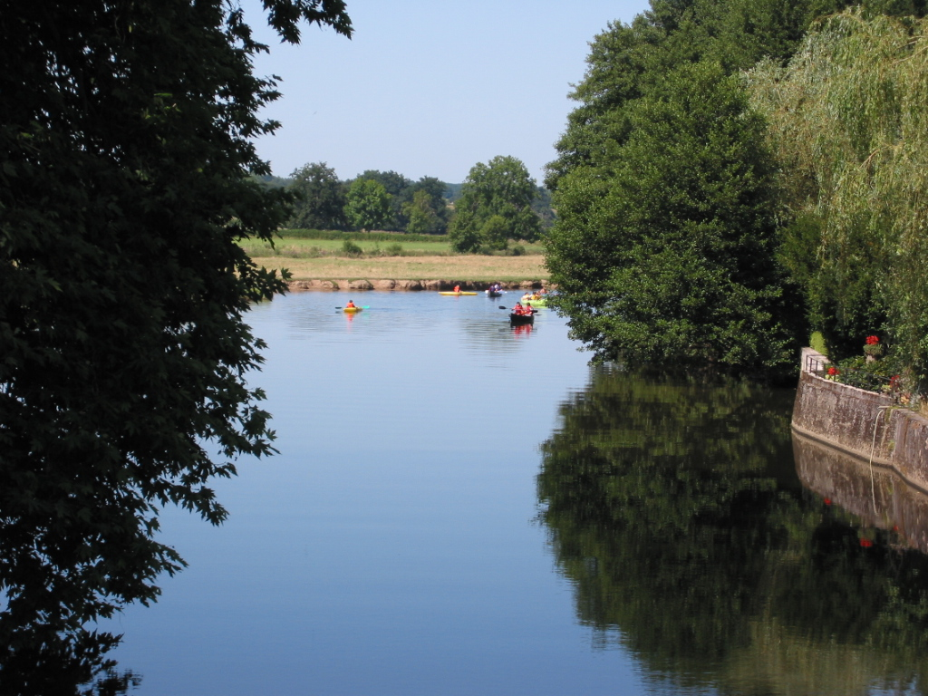 Jaligny-sur Besbre (France) - La Besbre